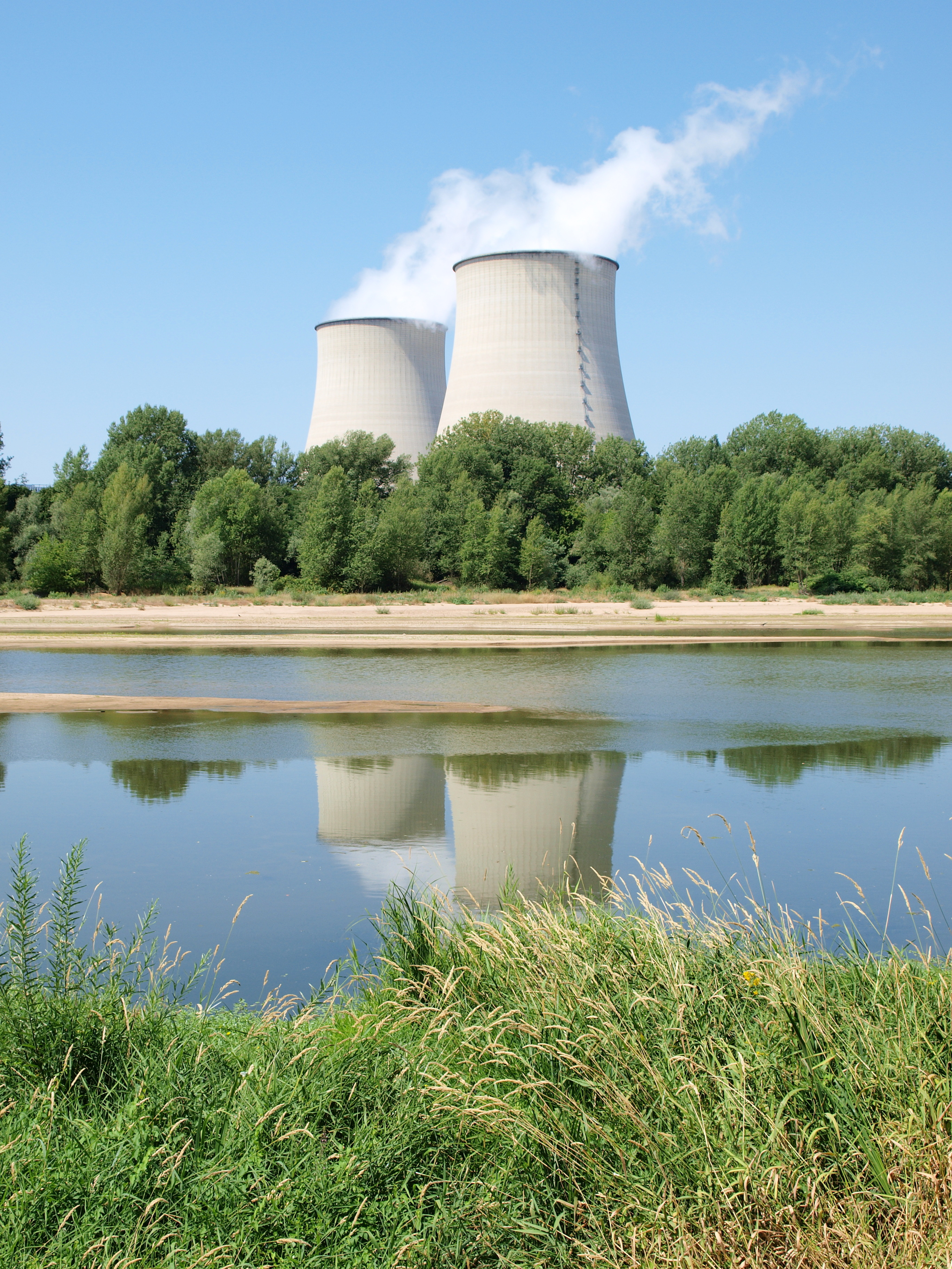 La centrale nucléaire de Belleville (Cher, France), vue de la rive nivernaise de la Loire.